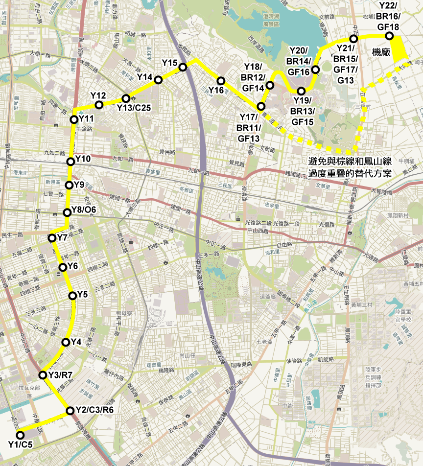 高雄捷運 輕軌黃線 2010年頃規劃